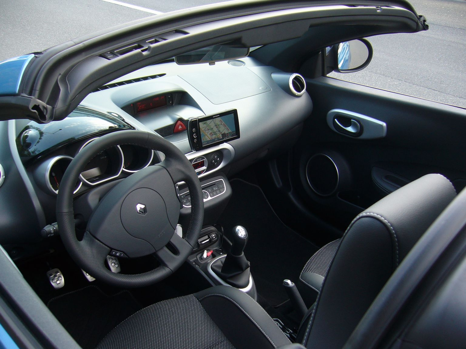 ルノー・ウインド